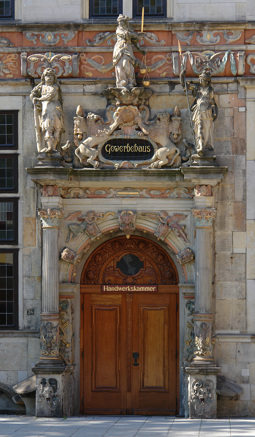 Gewerbehaus am Ansgarikirchhof 24 in Bremen (17. Jh.). Sitz der Handwerkskammer.